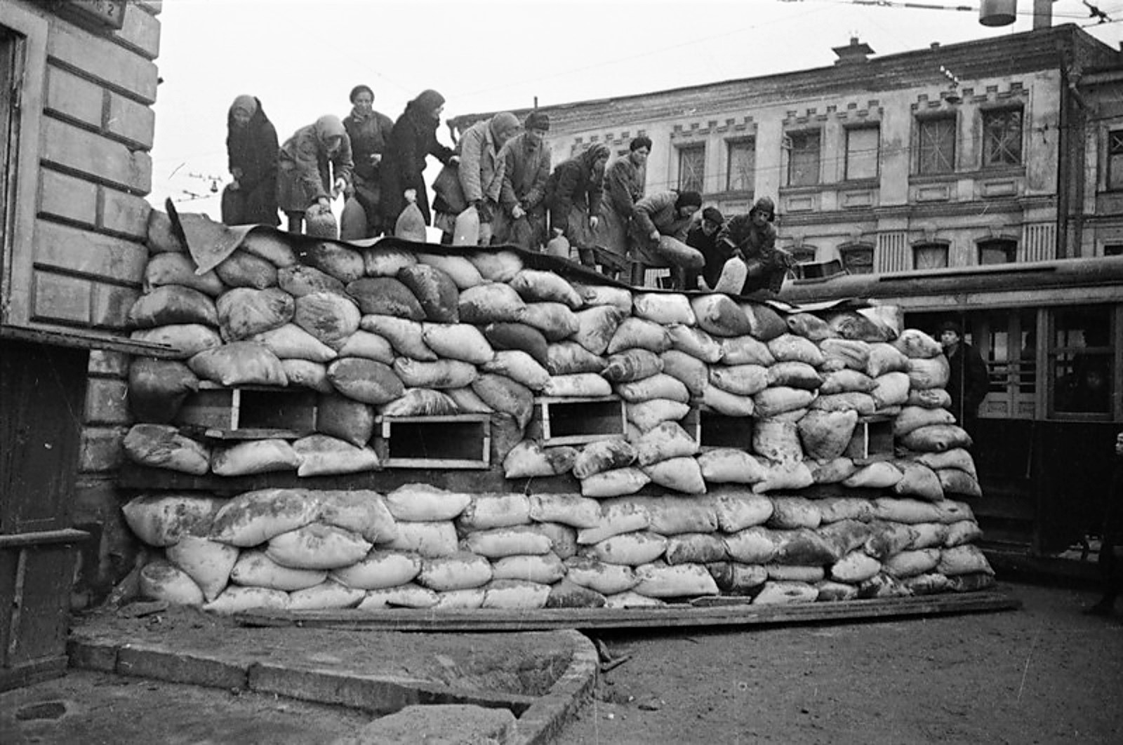 Москва прифронтовая. Баррикада на перекрестке улицы Балчуг и Лубочного переулка. Возведена для защиты Кремля под руководством инженера Павла Андреевича Соколова